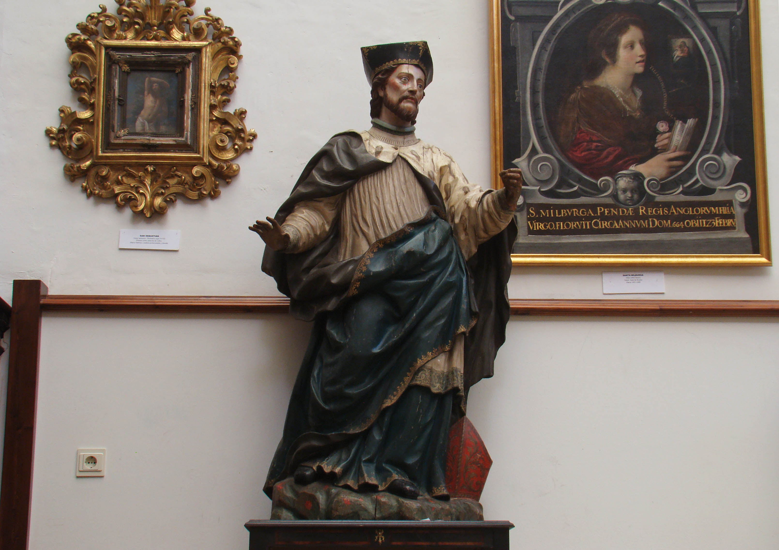 San Juan de Nepomuceno procedente de la desaparecida iglesia vallisoletana de San Miguel. Autor Alejandro Carnicero, hacia 1736. Se encuentra en la sacristía de la parroquia de San Miguel y San Julián en Valladolid.